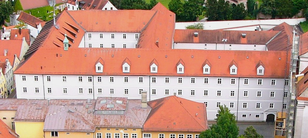 Das ehemalige Jesuitenkloster in Landshut.This is a photograph of an architectural monument.